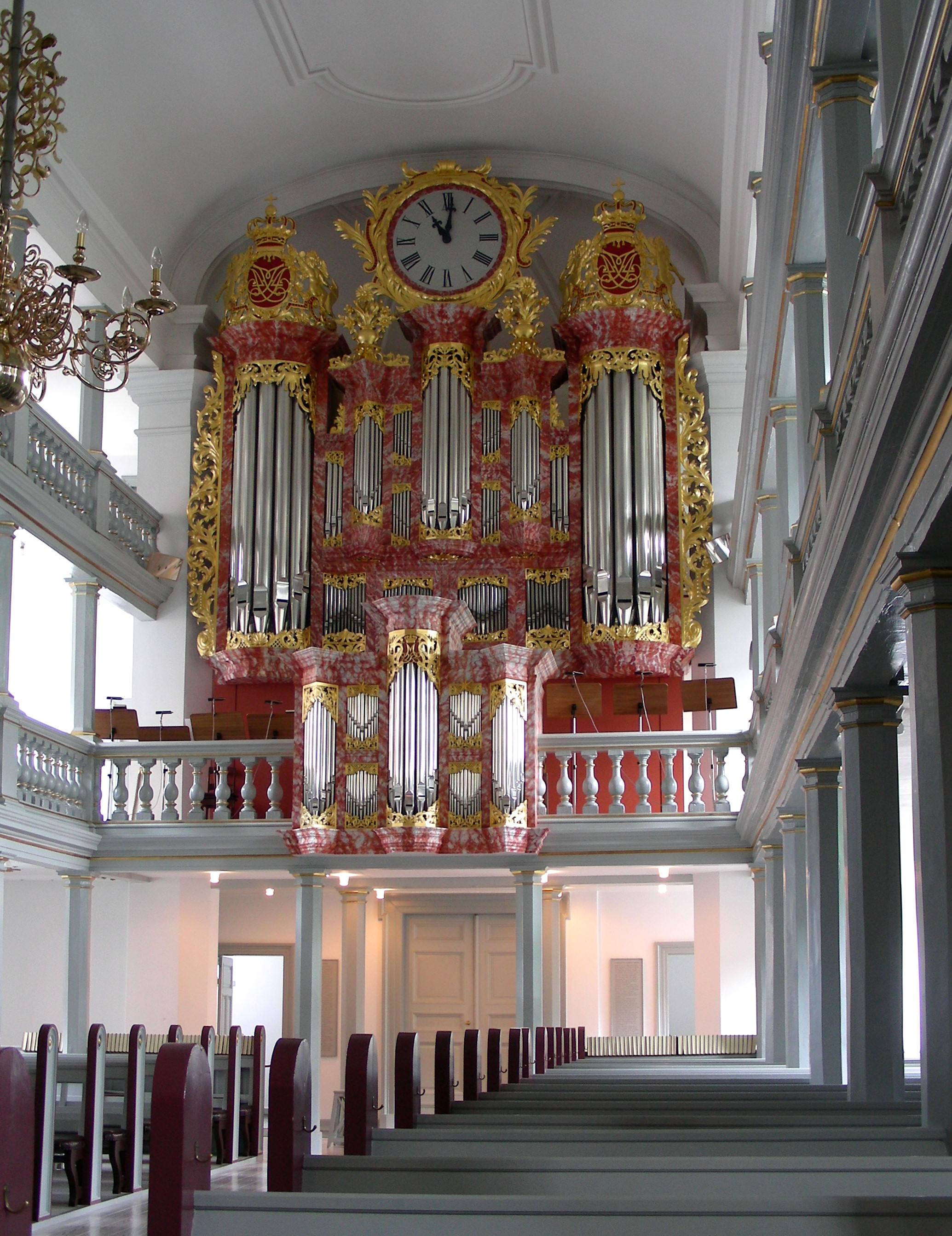 Garnisons Kirke (Garrison Church), Copenhagen, Denmark. Organ.